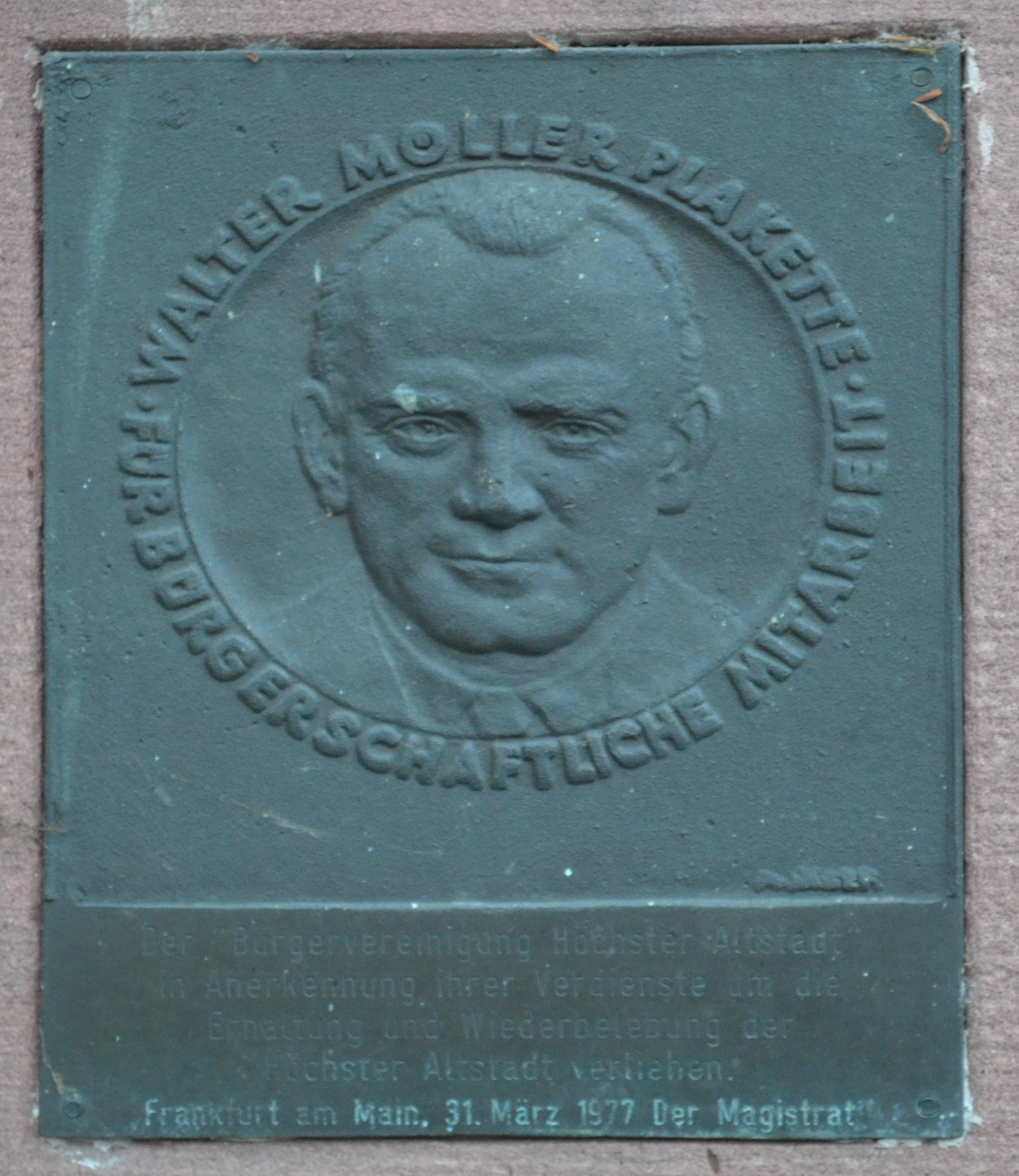 Frankfurt-Höchst-Dalberg-Brunnen, Walter Möller-Plakette